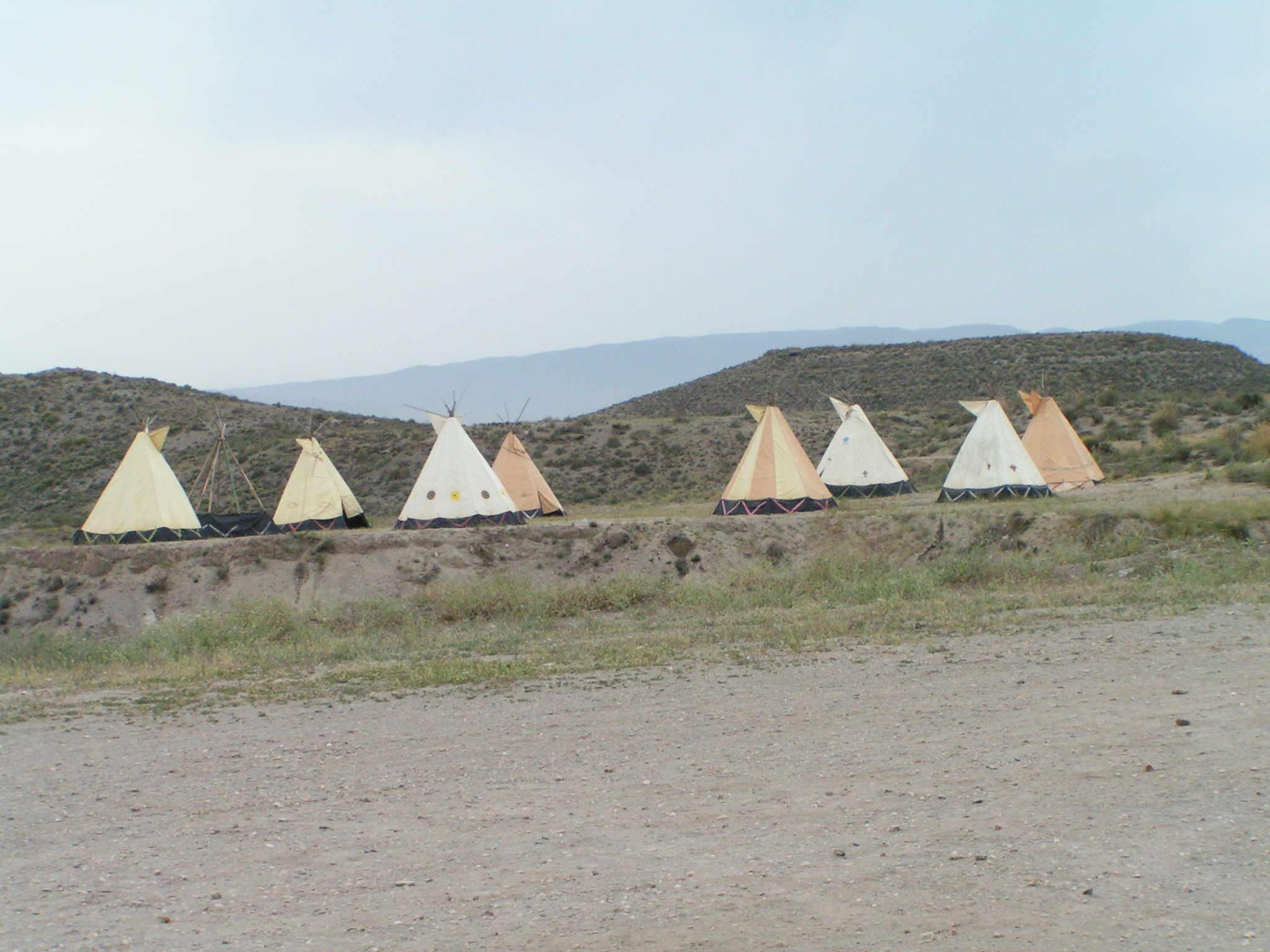 Tipis, Image personnelle